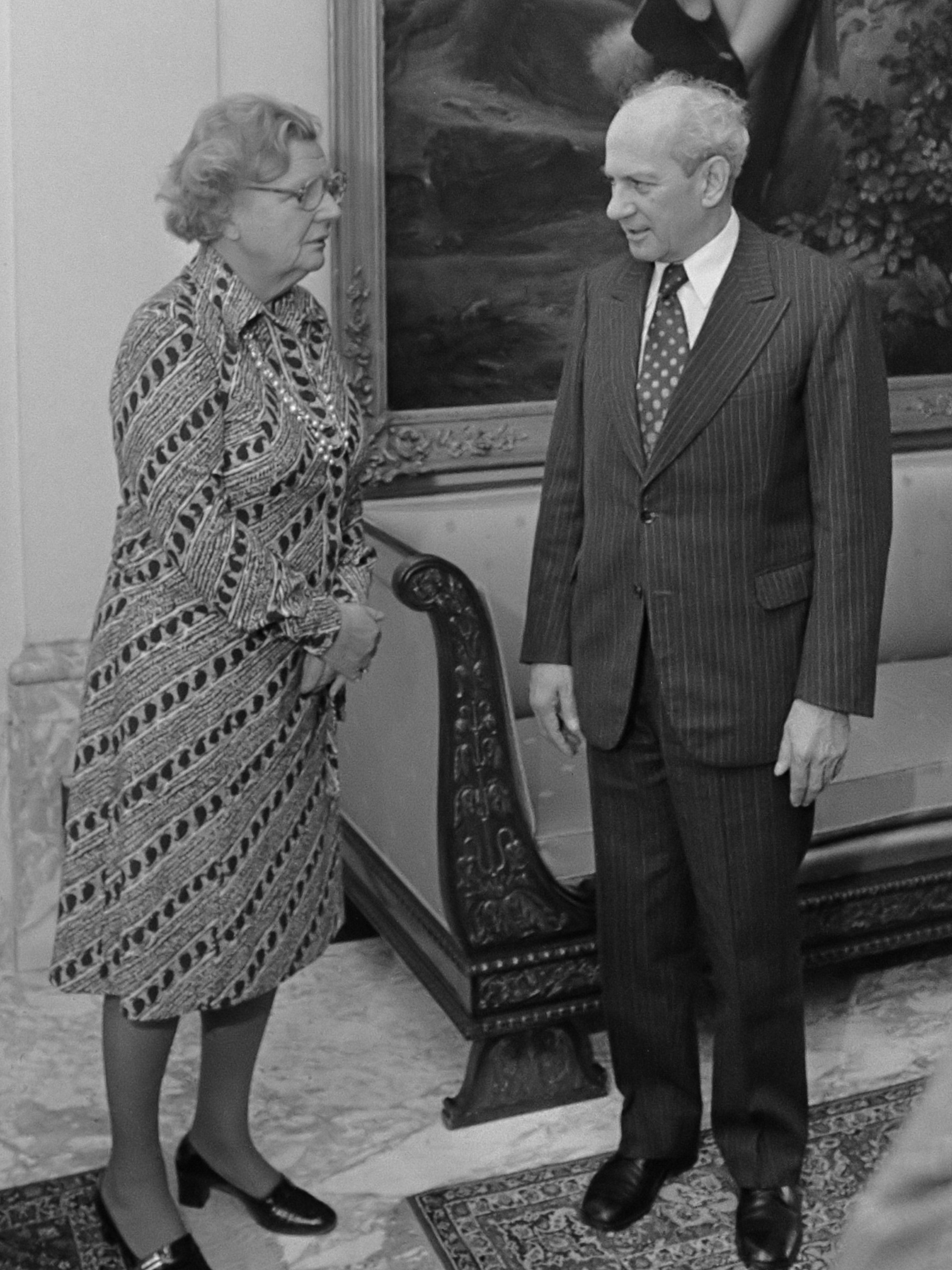 Koningin Juliana ontvangt de Joegoslavische minister Buitenlandse Zaken, Milos Minic, op paleis Soestdijk 4 december 1975